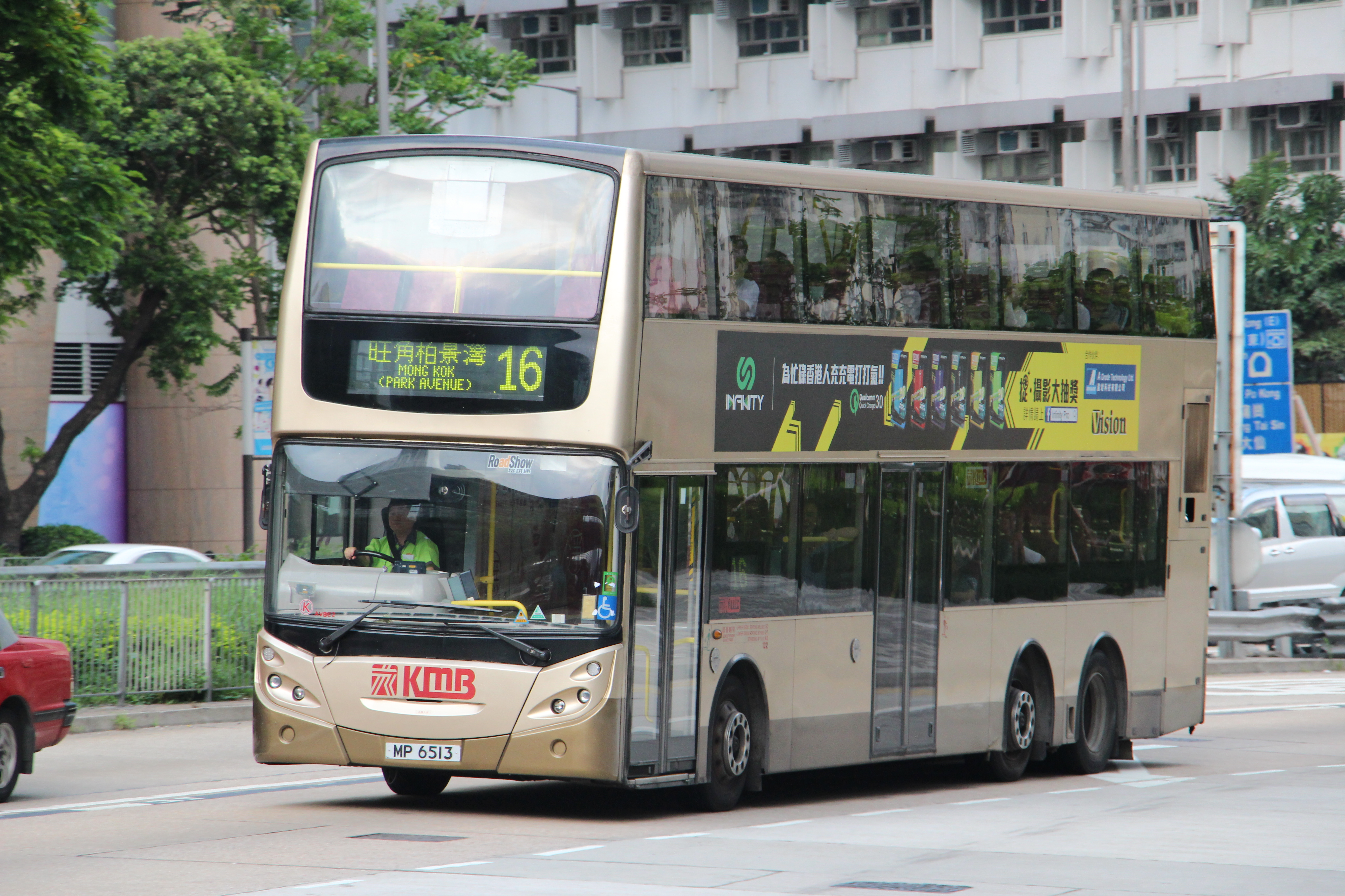 AVBE2(MP6513)@16